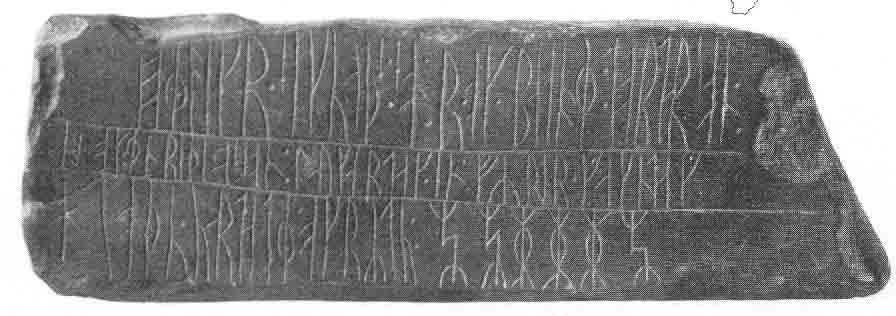 Kingigtorssuaq Runestone. Rundata ID: GR 1 M Runes el=likr * sikuaþs : so=r * ok * baan=ne : torta=r son : ok enriþi * os son : laukardak*in : fyrir * gakndag hloþu * ua=rda te * ok rydu : ?????? Transcription Erlingr Sighvats sonr ok Bjarni Þórðar sonr ok Eindriði Odds sonr laugardagin fyrir gagndag hlóðu varða þe[ssa] ok ... ... Translation Erling Sigvatsson, Bjarne Thordarson and Enride Oddson Saturday before gangdag (April 25th) made these stone cairns